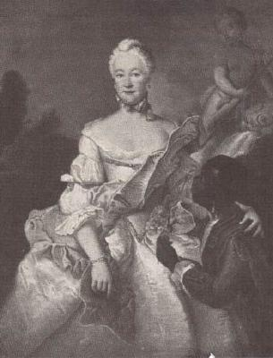 Henriette Karoline von Pfalz-Zweibrücken, Landgräfin von Hessen-Darmstadt, mit dem Mohren.